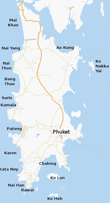 Cartina di Phuket